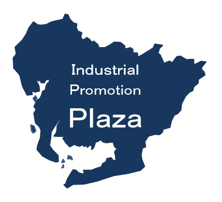 先端技術産業振興プラザ・ロゴマーク